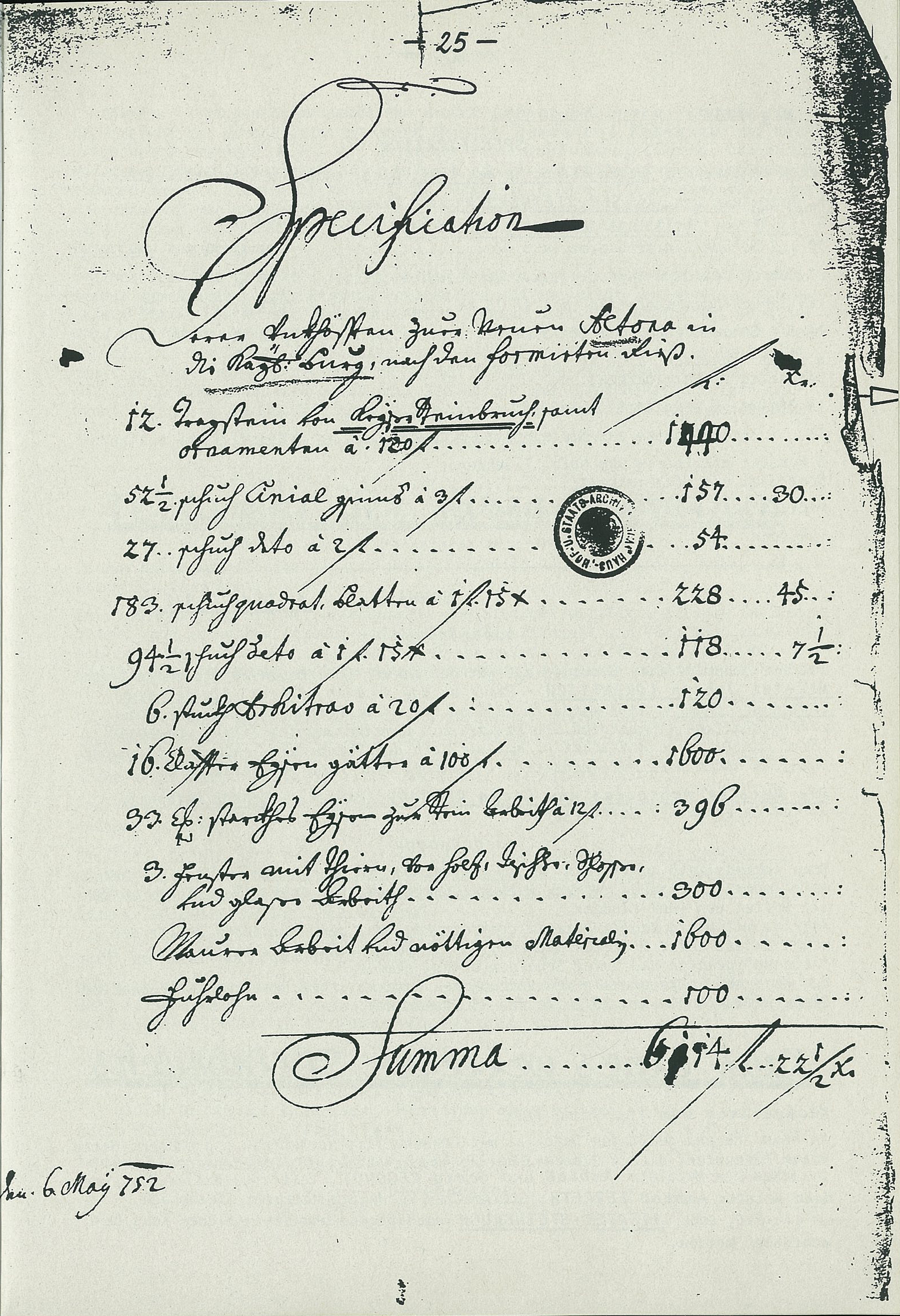 Steinmetzauftrag_1752, Haus- und Hof- und Staatsarchiv, Hofbauamt, danach Steinmetzmuseum Kaisersteinbruch